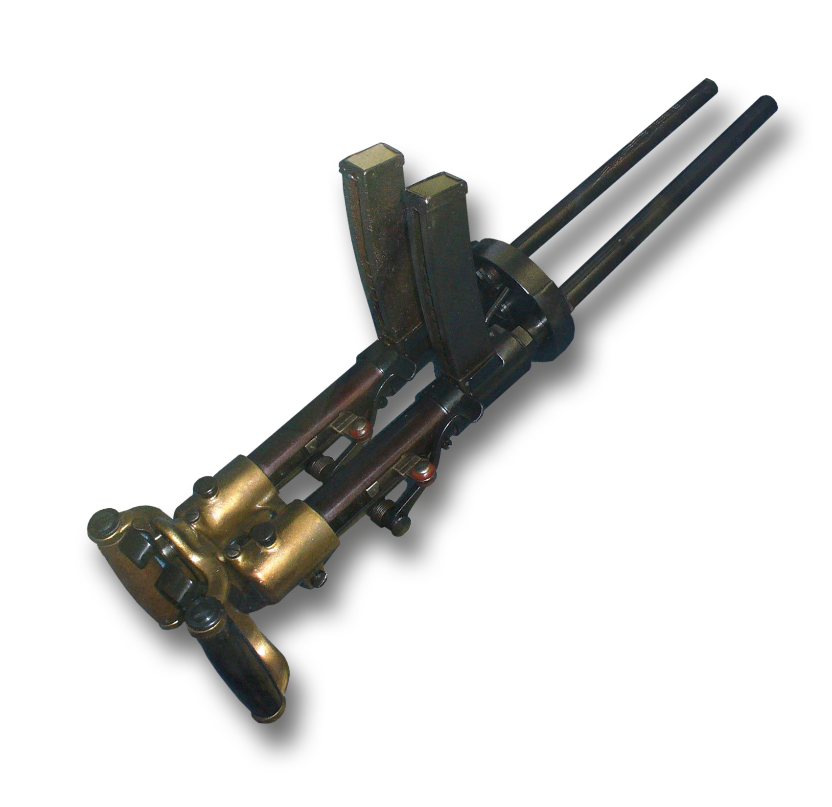 Villar-Perosa modello 1915, Italian submachine gun